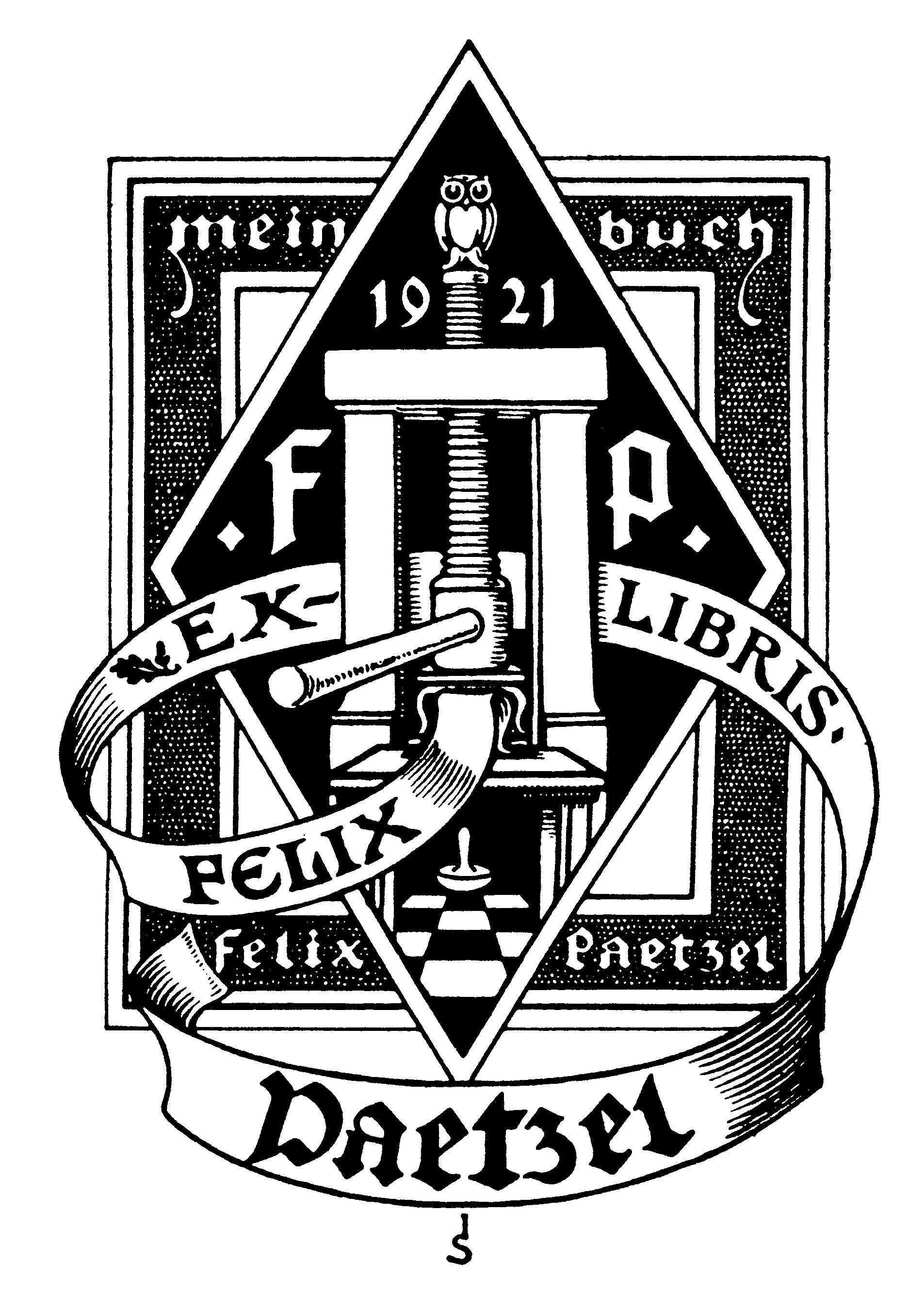 Ex Libris, F. Paetzel, 1921